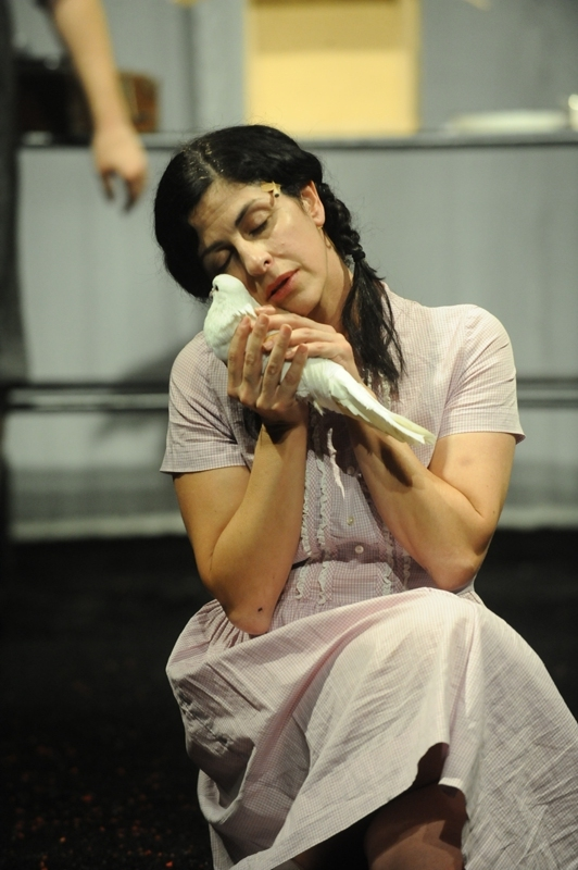 אפרת בן צור - יונה ונער - 2011